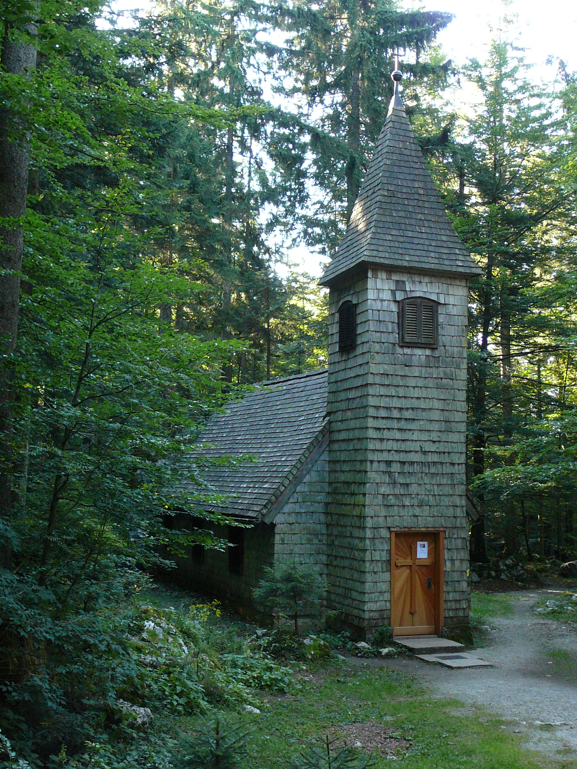 Wilhelmskapelle in St. Koloman, Salzburg, Austria